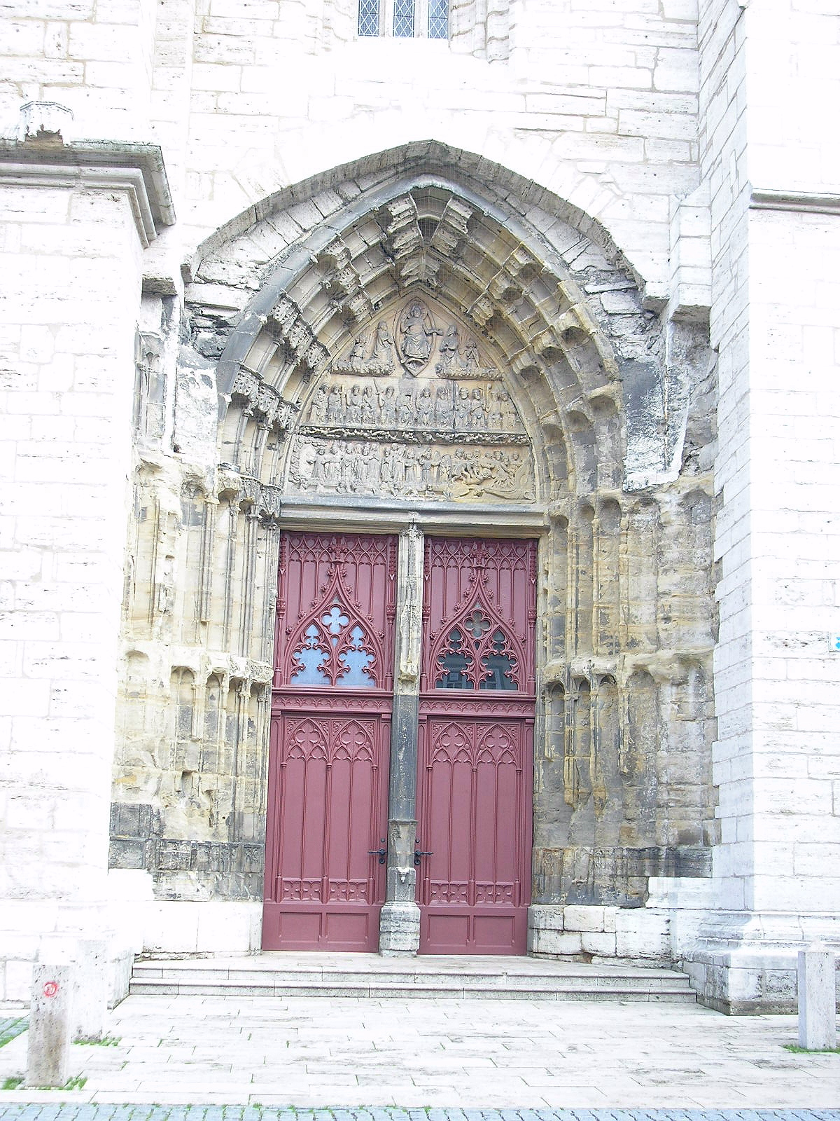 Das Westportal der Marktkirche von Bad Langensalza (Thüringen)